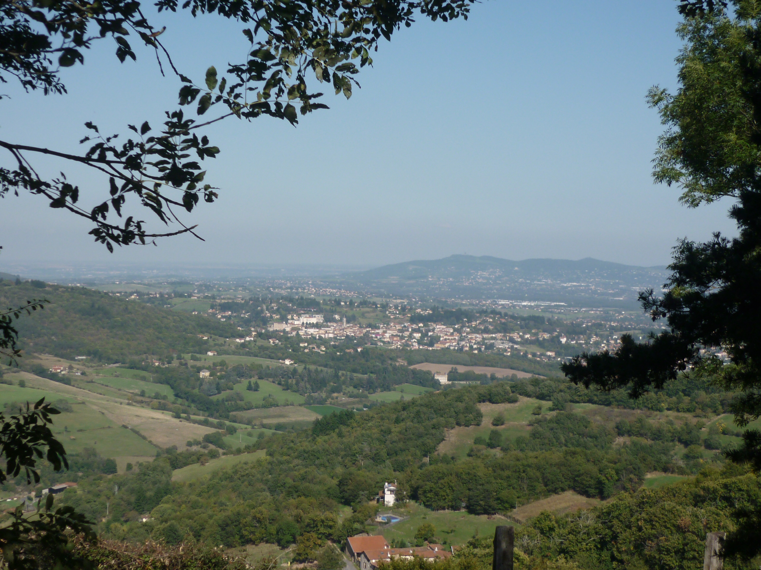 Vue sur Vaugneray depuis les environs de Chateauvieux, 10/2010